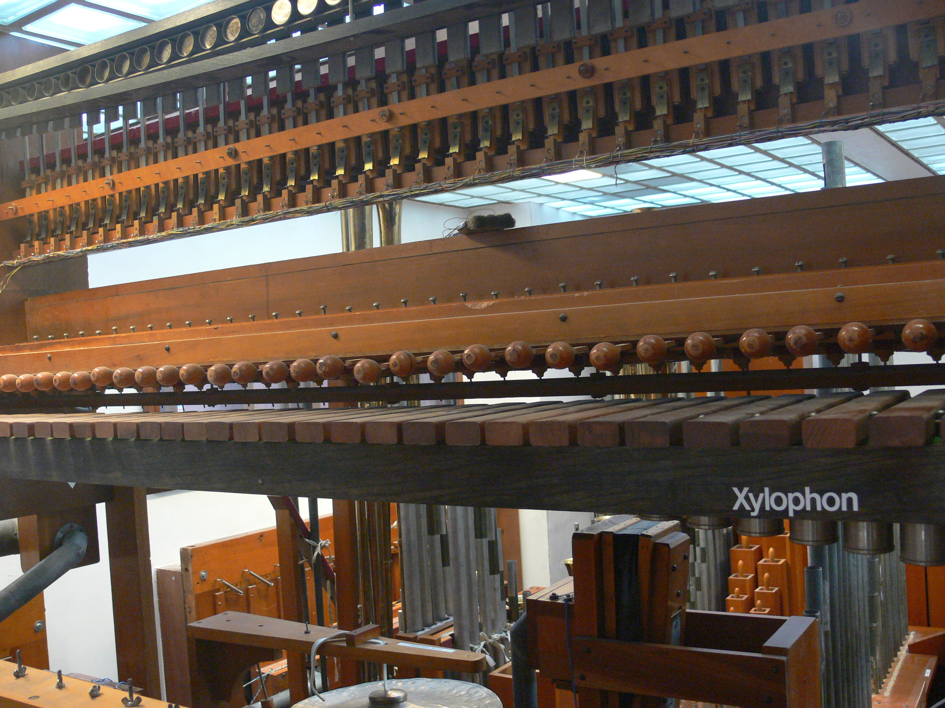 Mighty Wurlitzer, Musikinstrumenten-Museum Berlin Xylophone